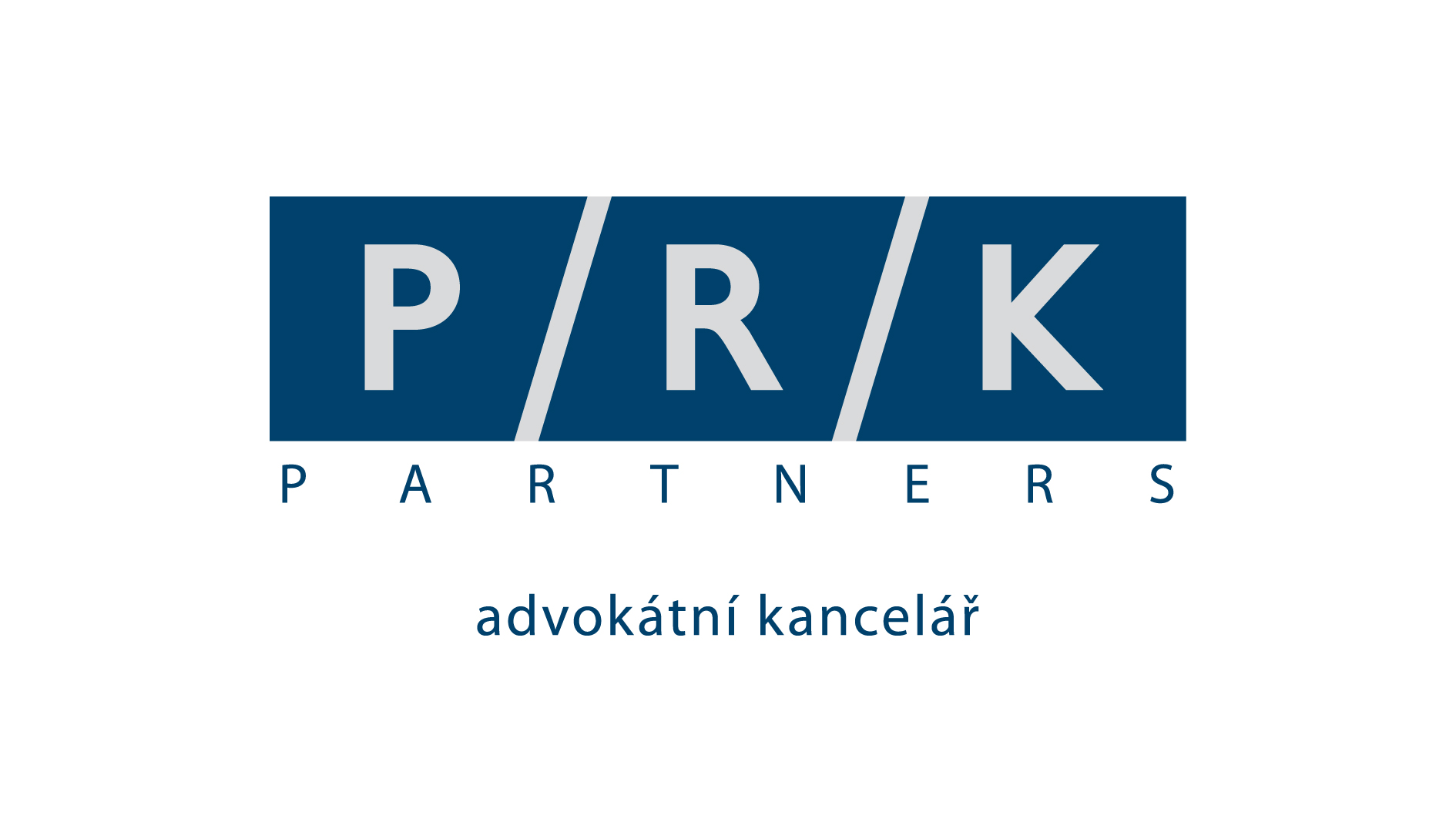 Logo PRK